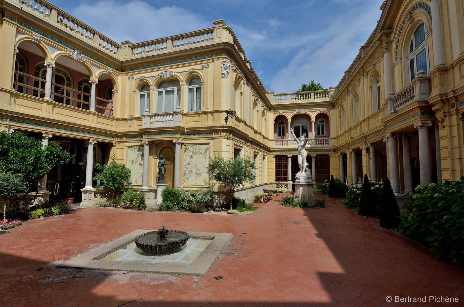 Propriété de la Ville de Perpignan.C'est Pierre Bardou, fils du fondateur de l'entreprise de papier à cigarettes J.O.B qui, grâce à la fortune familiale, achète d'abord en 1852 une maison rue Saint-Sauveur (rue E. Zola) puis en 1872, d'autres habitations voisines et construit les premiers ateliers éclairés par la magnifique verrière.